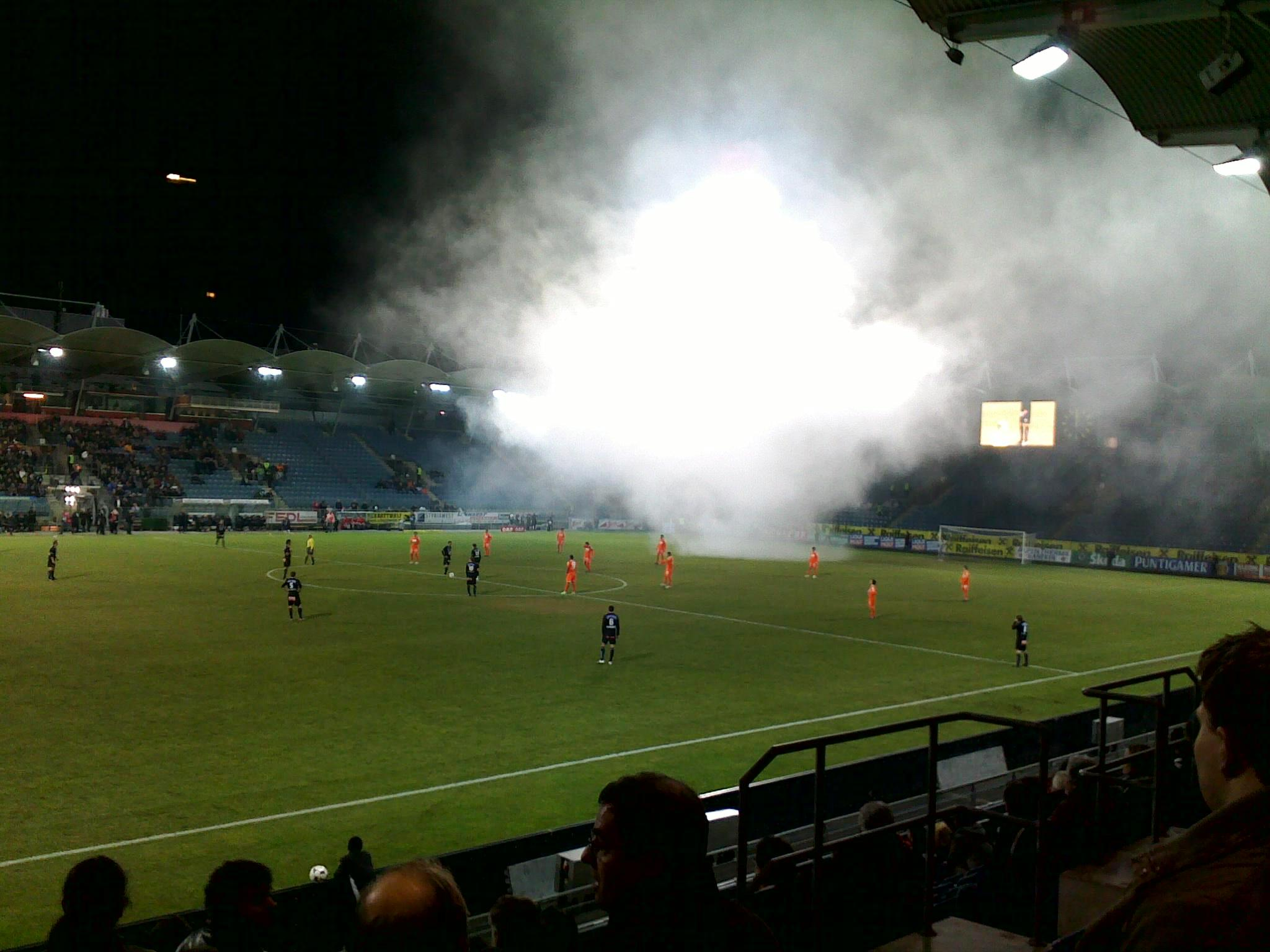 SK Sturm Graz (in schwarz) gegen die FK Austria Wien (in orange) während des ÖFB-Cup-Viertelfinales am 3. März 2009 in der UPC-Arena